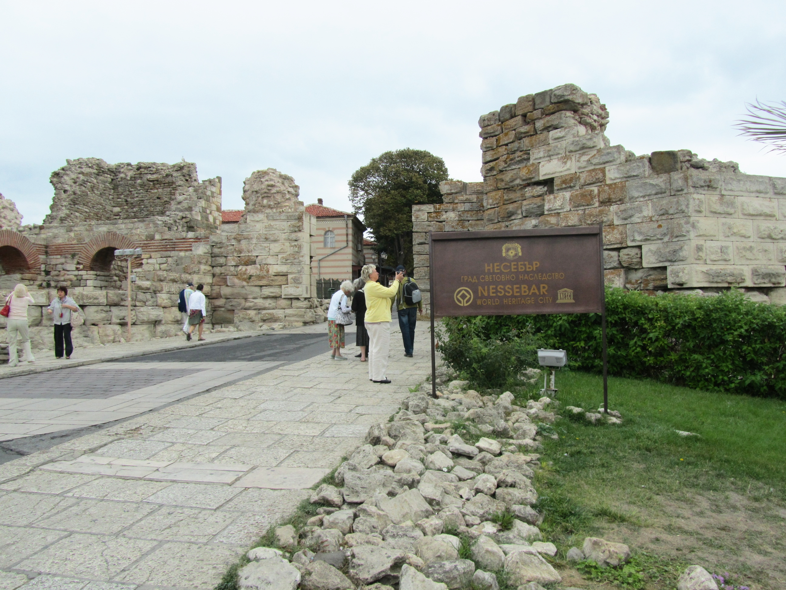 Nessebar, in der Nähe von Sonnenstrand, Bulgarien